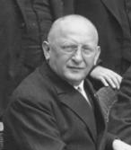 Berlin, Juni 1928 - Reichskabinett Müller-Franken. Sitzend von links nach rechts Reichsjustiz-Minister Koch-Weser; Reichskanzler Müller-Franken; Reichswehrminister General Groener; Reichsarbeits-Minister Wissell. Stehend v.l.n.r.: Reichsernährungsminister Dietrich/Baden; Reichsfinanzminister Dr. Hilferding; Reichswirtschafts-Minister Dr. Curtius; Reichsinnenminister Severing; Reichsverkehrsminister von Guerard ; Reichspostminister Schätzel. Information added by Wikimedia users. Kabinett Hermann Müller II 28. Juni 1928 – 27. März 1930